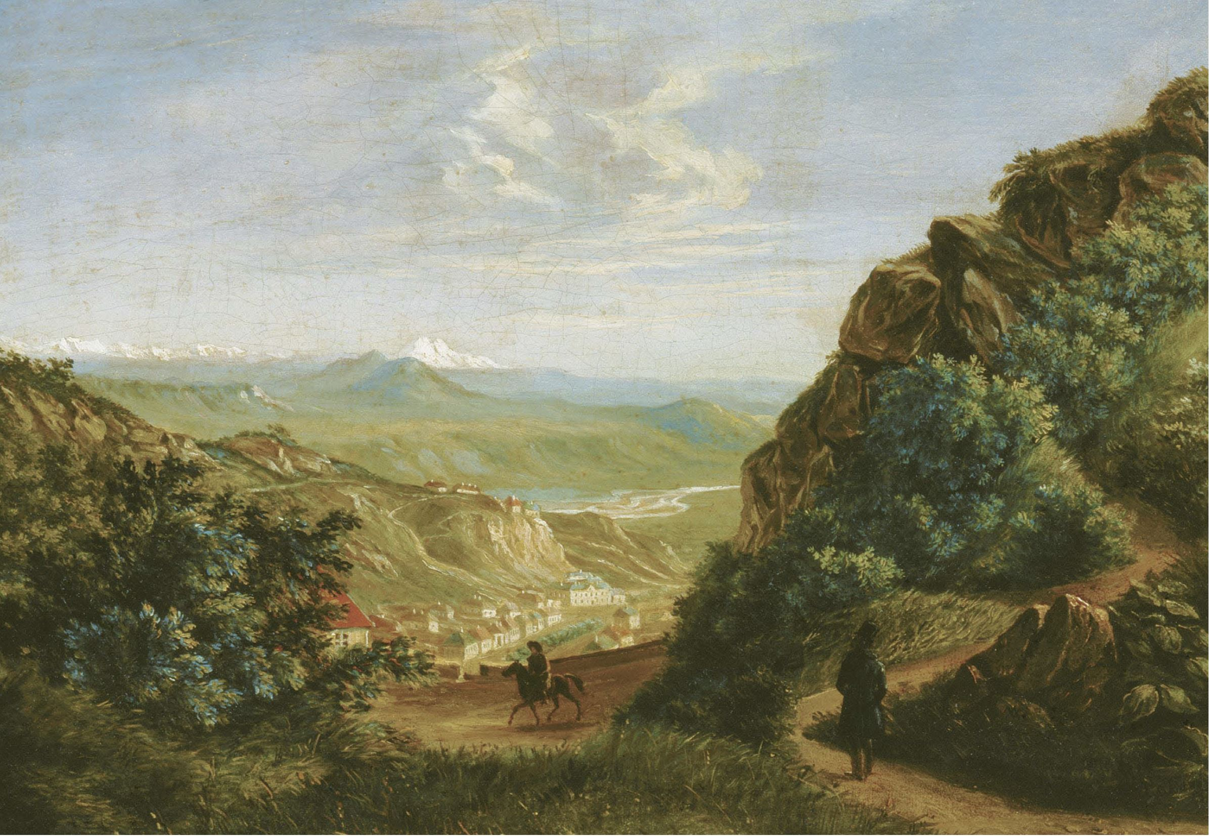 Лермонтов - Пятигорск. масло, 1837